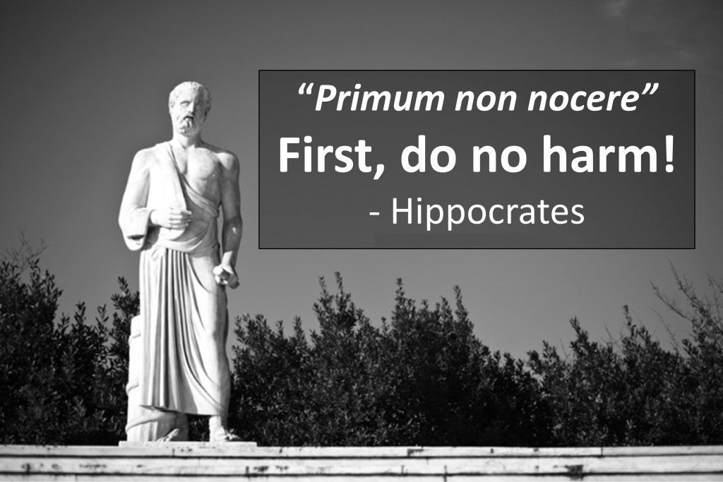 Hippocrates